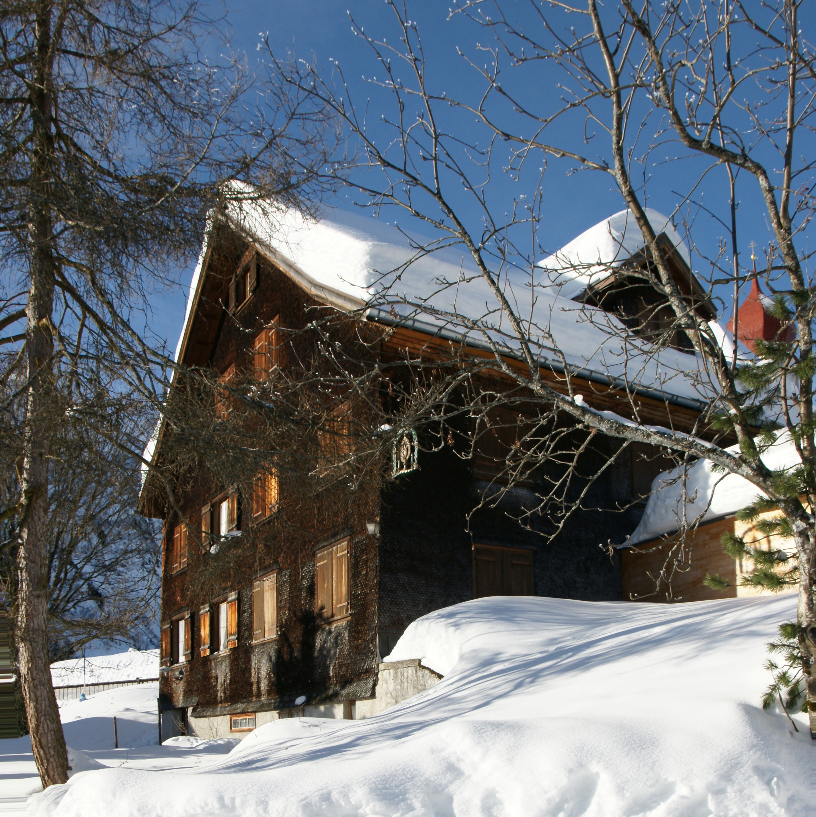 Pfarrhaus Nr. 133 in Damüls, Bezeichnet 1609, unterhalb der Kirche am Hang gelegen. 2geschossiger verschindelter Blockbau, ausgebautes Giebelgeschoß.